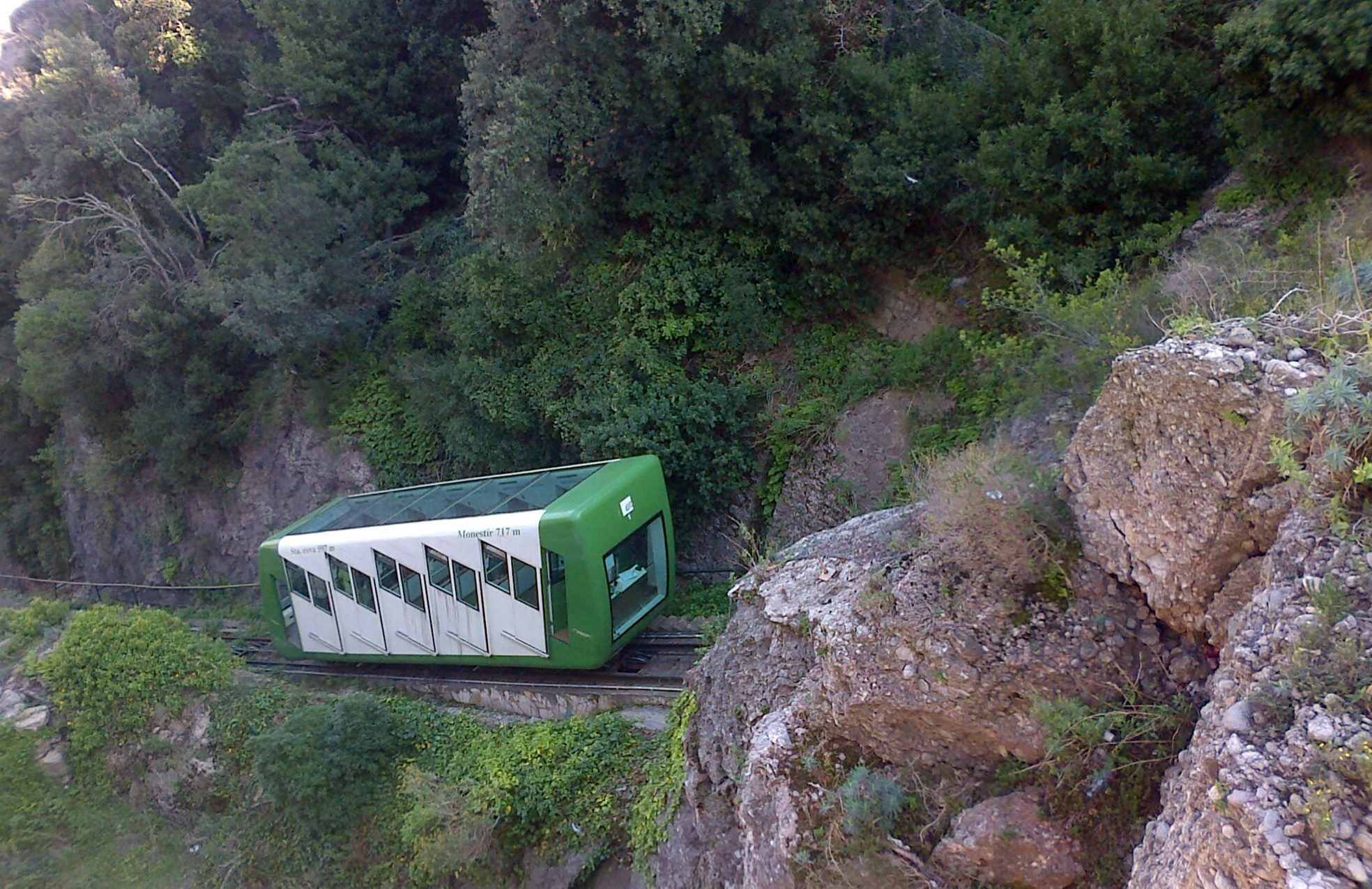 Funicular Von Roll de la Santa Cova, adquirit el 2001